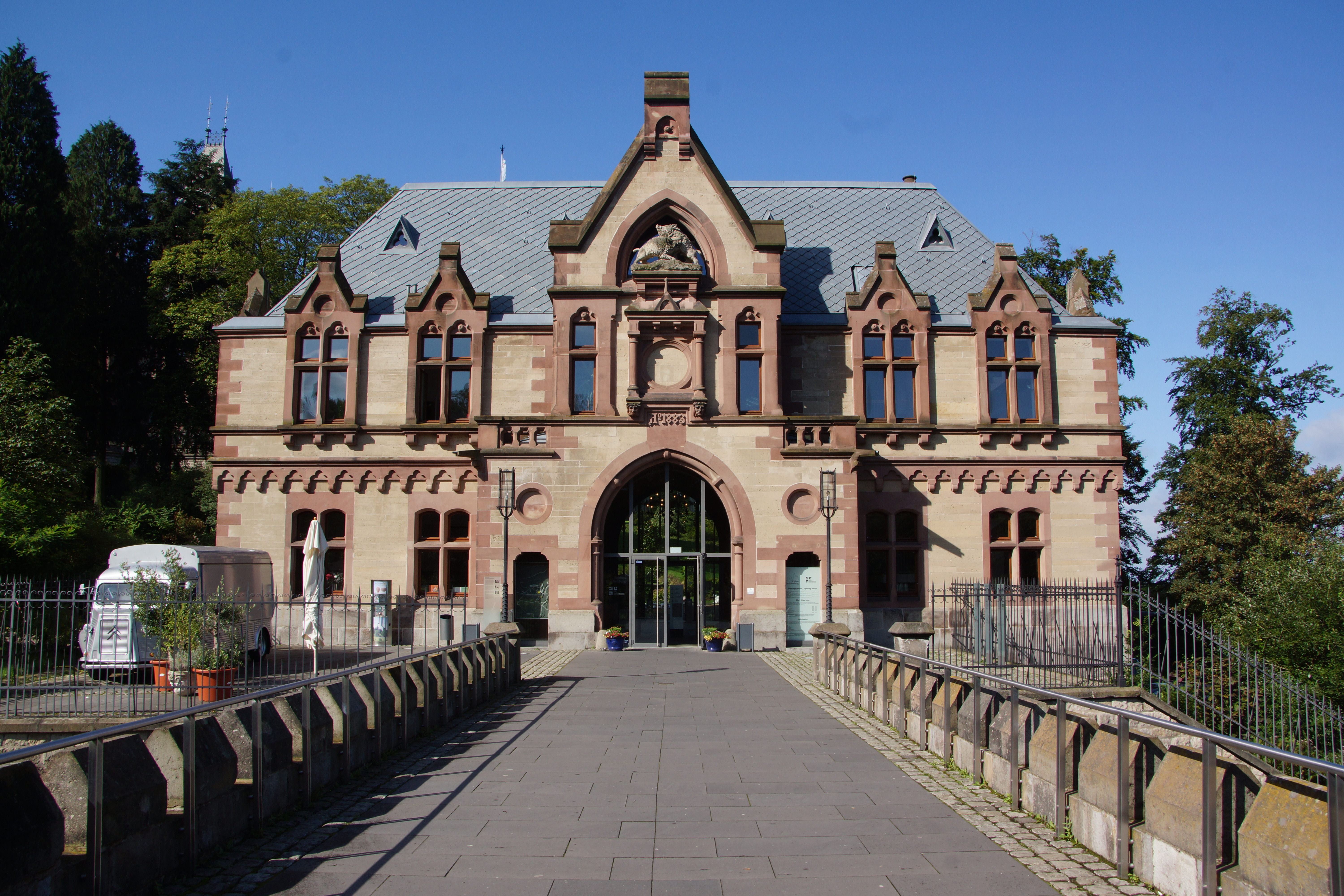 Vorburg Schloss Drachenburg, seit 2002 Deutsches Museum für Naturschutzgeschichte